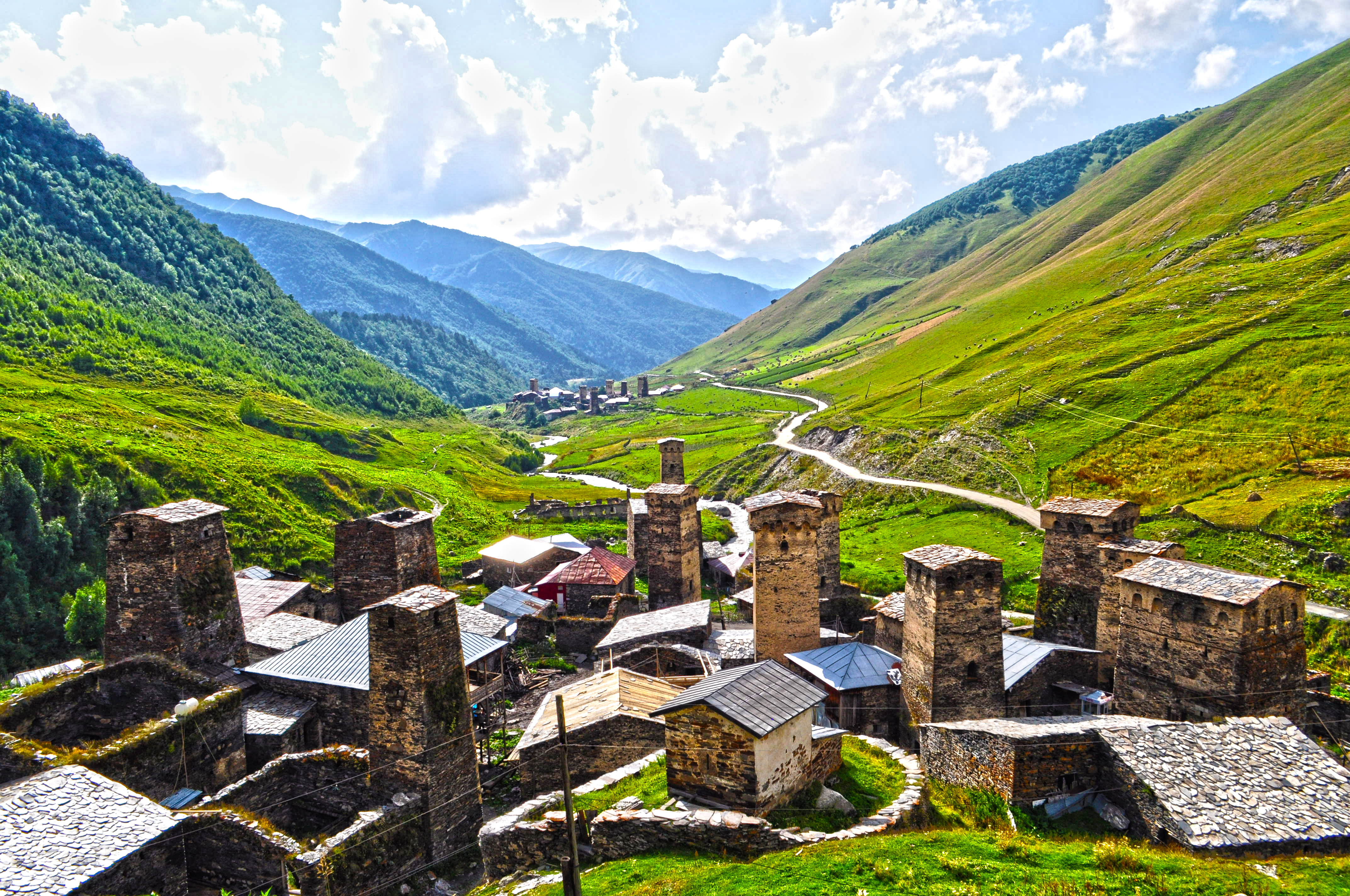 სოფელ ჩაჟაშის განაშენიანება